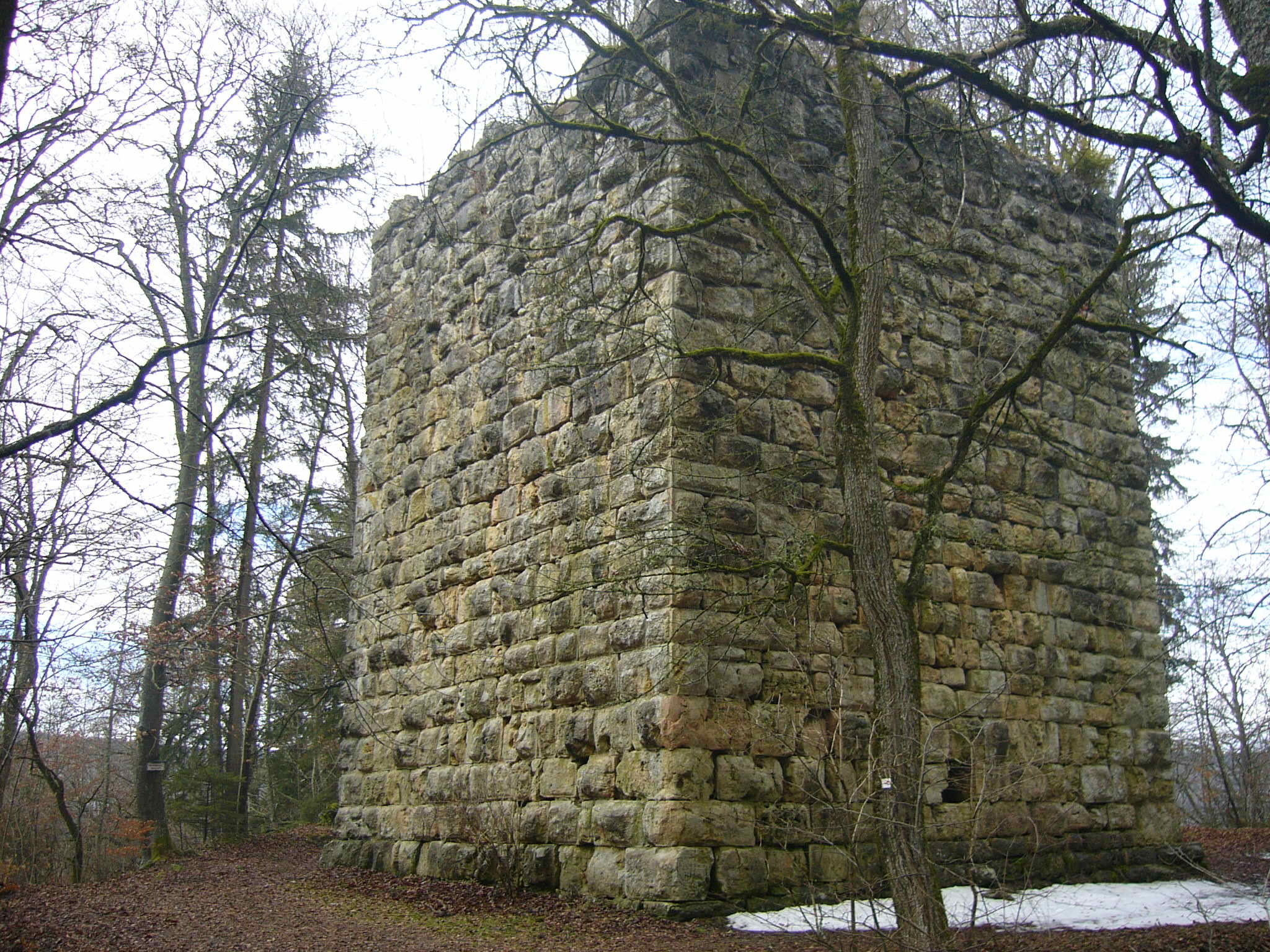 Ruine der Burg Konzenberg, Gemeinde Wurmlingen (bei Tuttlingen)